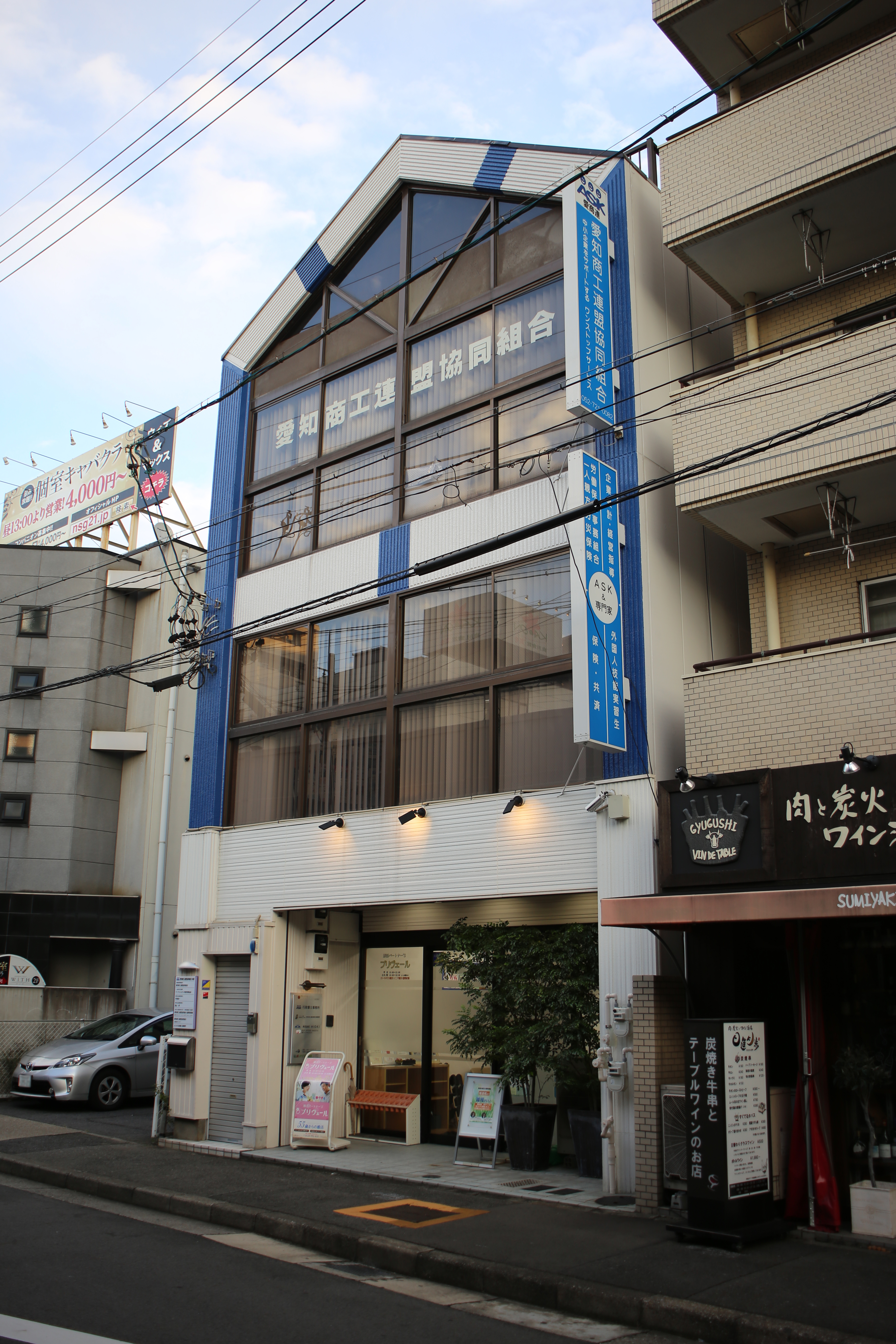 名古屋市東区矢田一丁目の愛商連本部会館